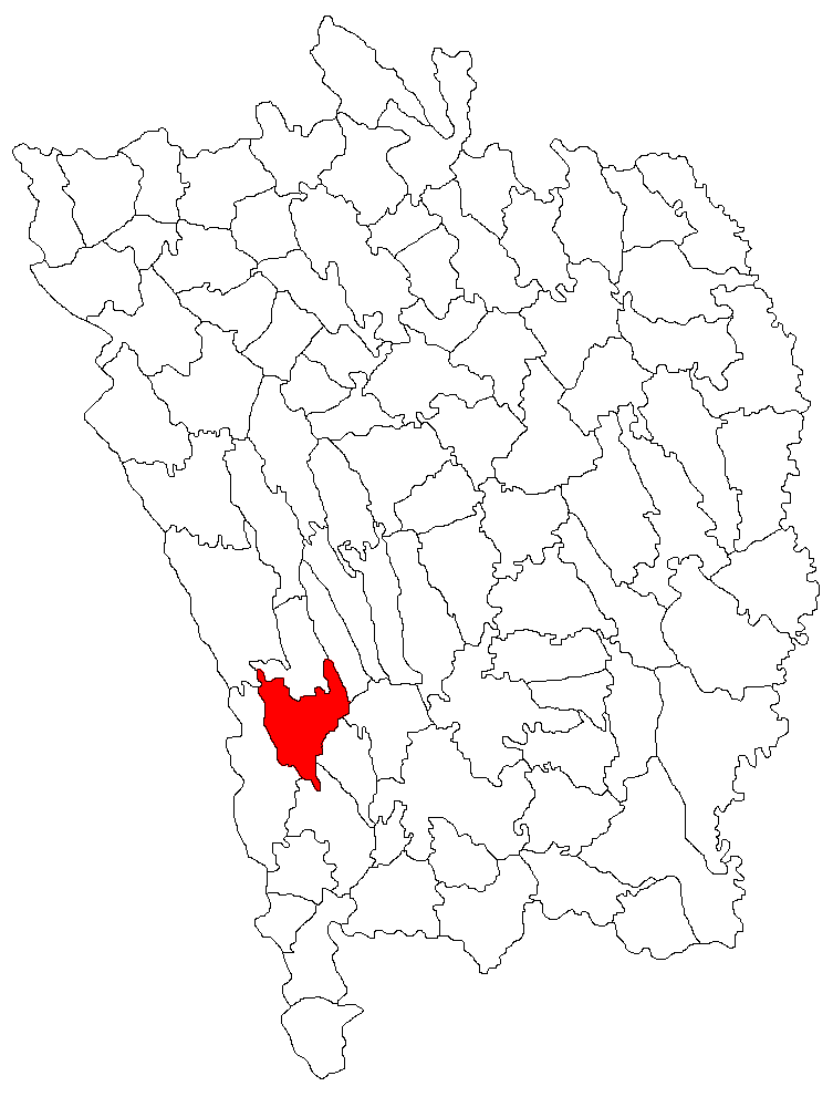 Categorie:Hărţi ale judeţului Vaslui